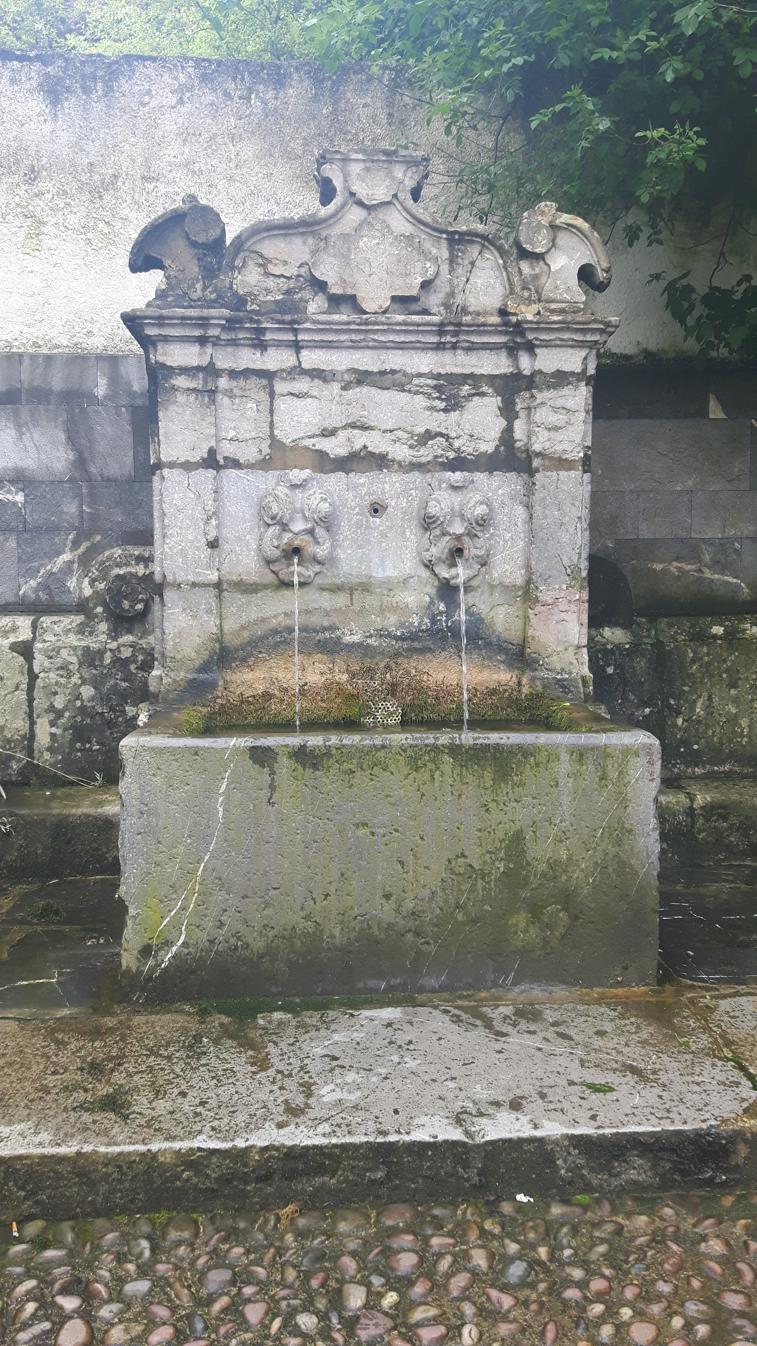 Frente de la fuente de la Fontana, Pravia, Asturias.